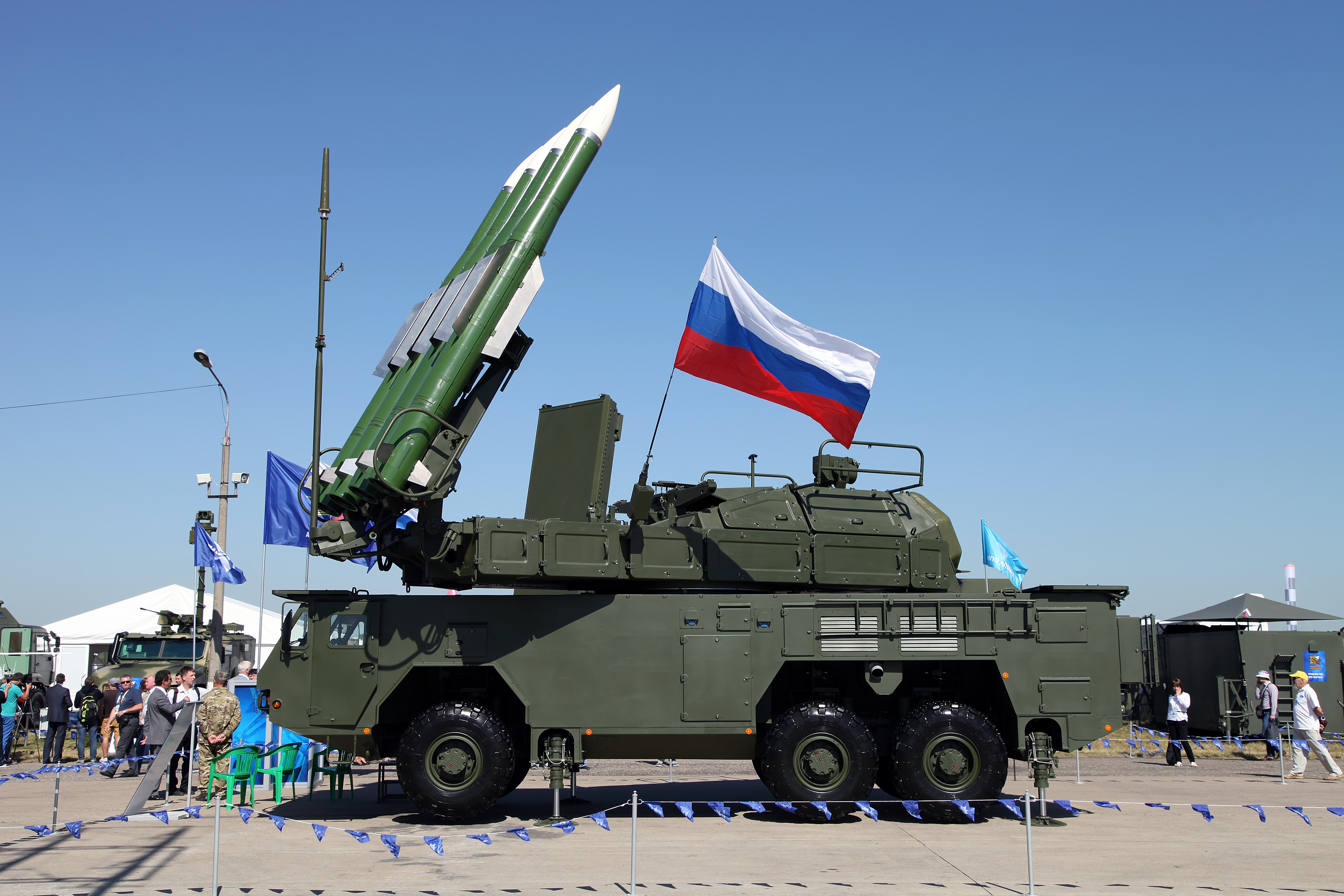 ЗРК Бук-М2Э (Buk-M2E system)